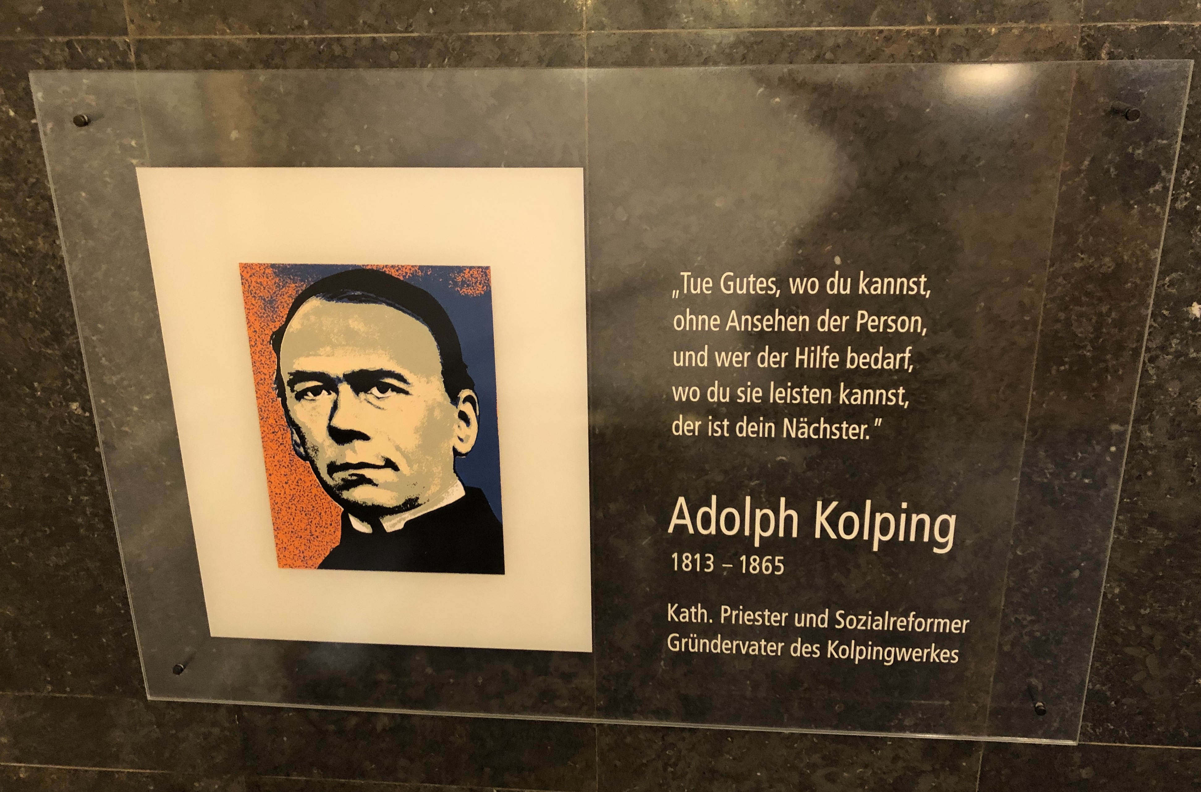 Adolph Kolping an einem Kolping-Hotel in Freiburg i.B.